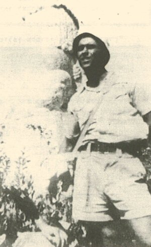 אליעזר קשאני, בצעירותו בתל חי התצלום באישור תנועת בית"ר, כמו כן פגו זכויות היוצרים על התמונה בשל התיישנות.